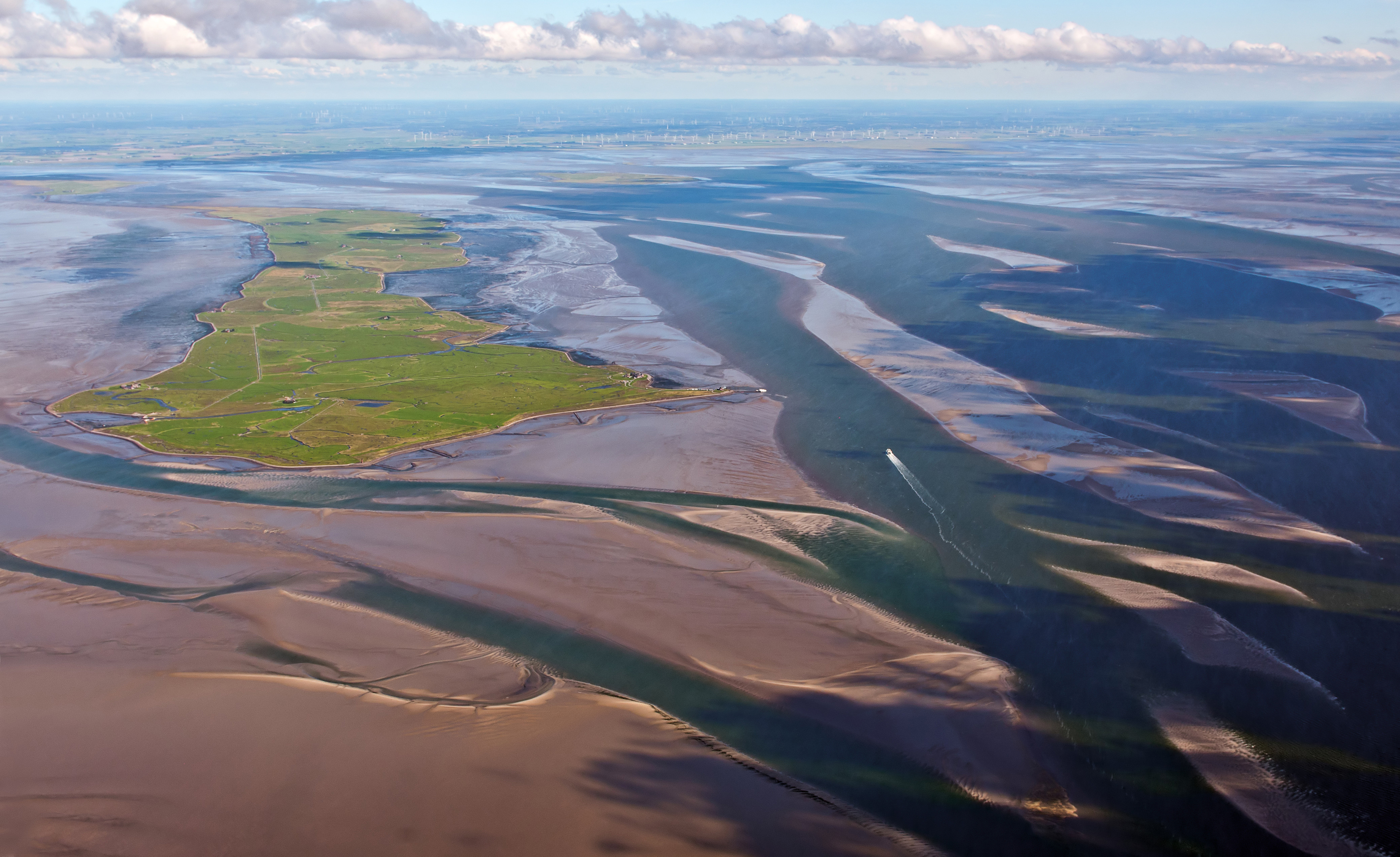 Fotoflug über das nordfriesische Wattenmeer – Langeneß (von W)